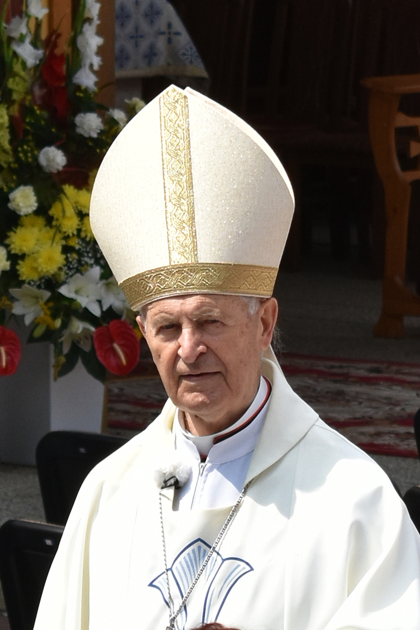 Jozef kardinál Tomko na hore Zvir v Litmanovej